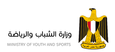 شعار وزارة الشباب و الرياضة